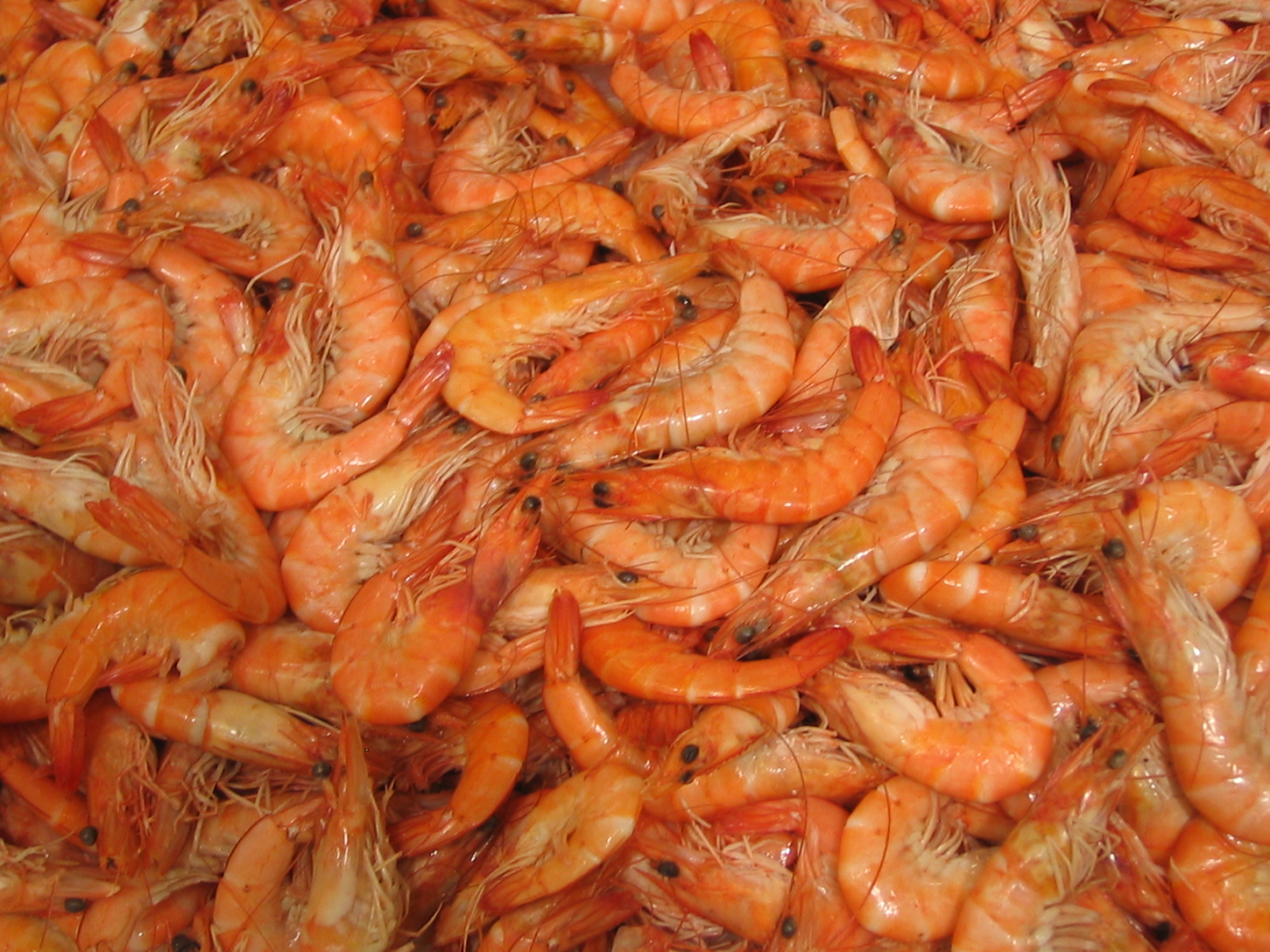 Prawns